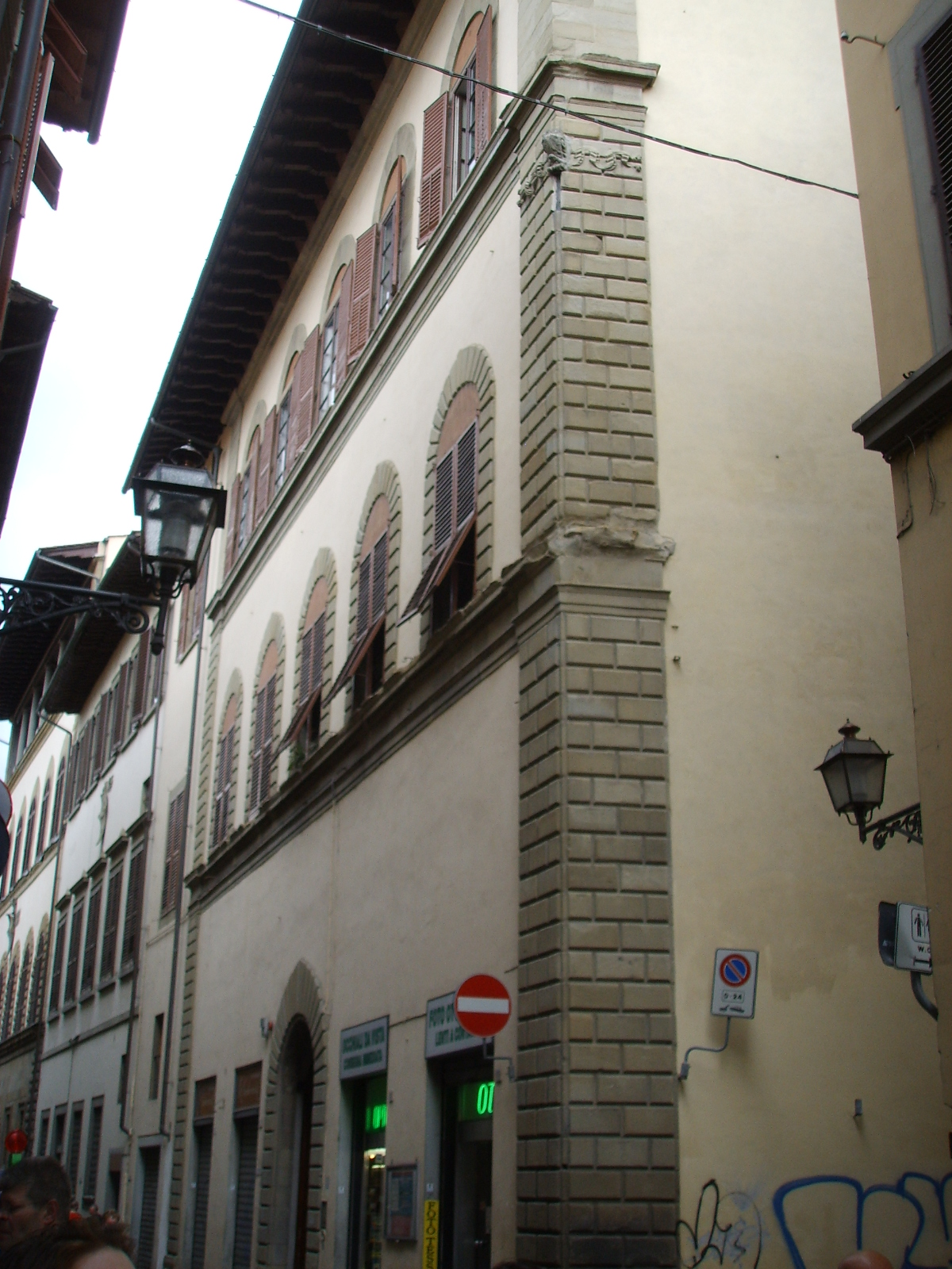 Palazzo taddei, esterno